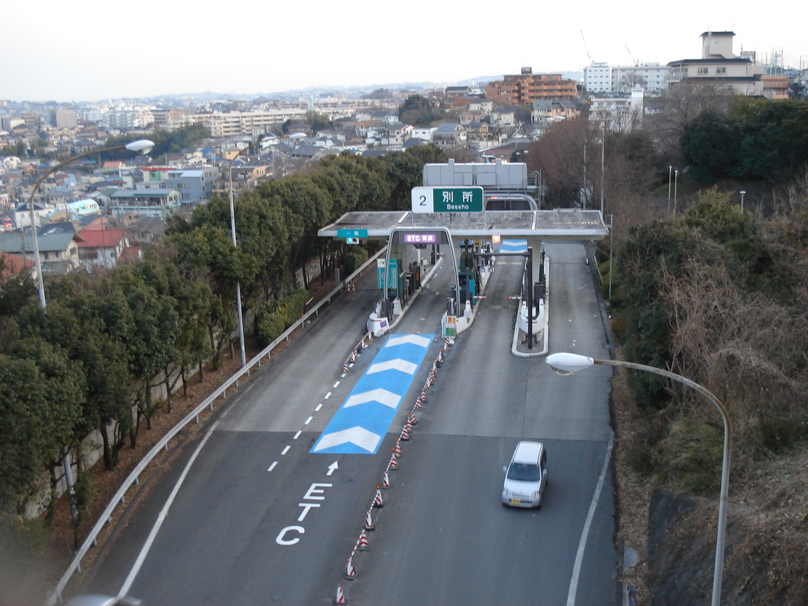 別所出口料金所